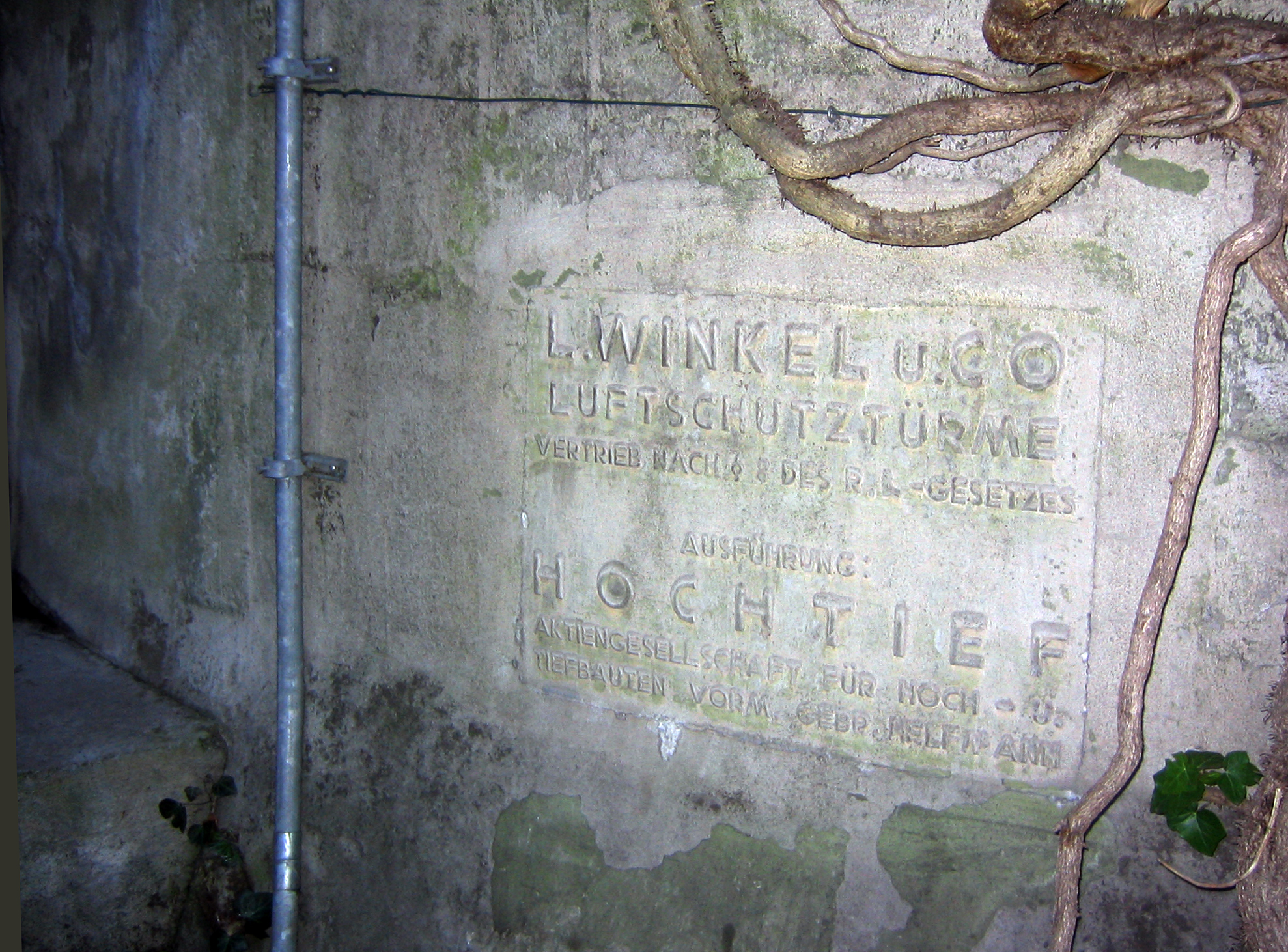 Hürth-Goldenberg-Werk-Luftschutz-Hochbunker